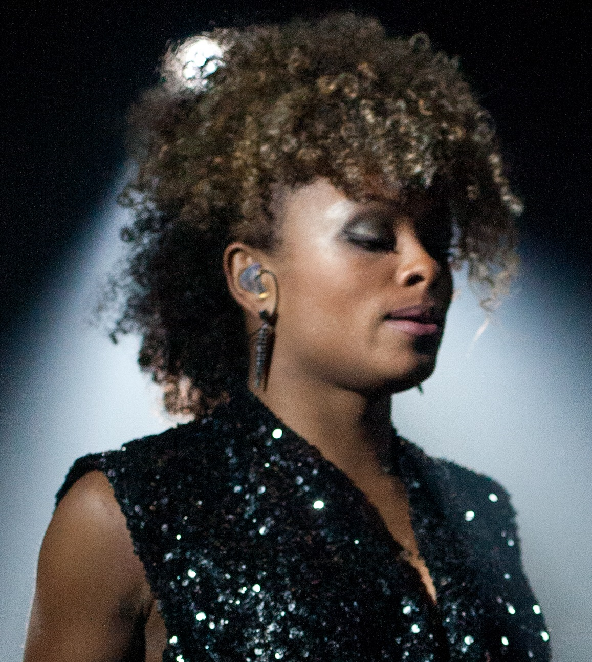 fleur east performing with dj fresh